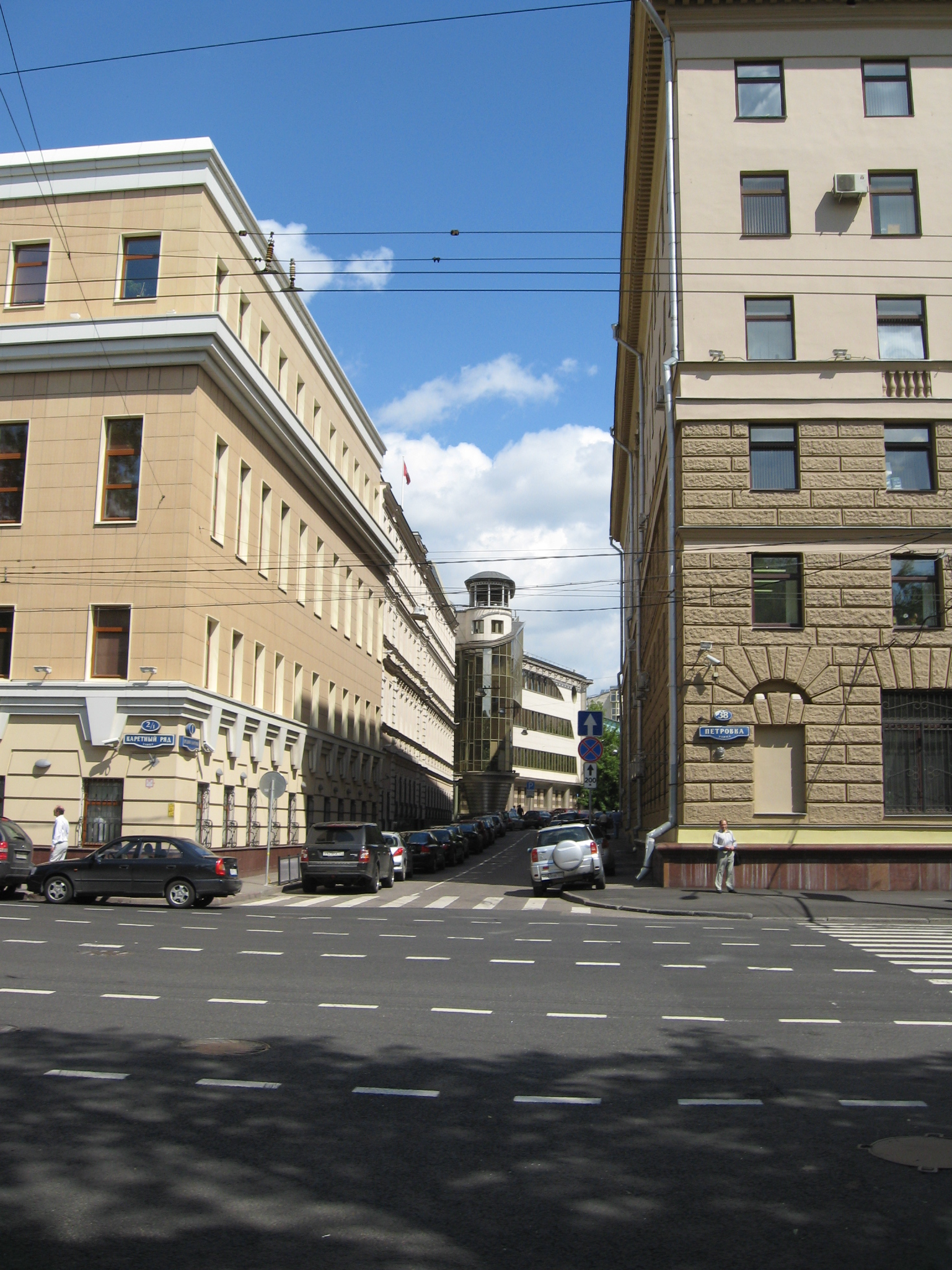 Вид с Петровки в Средний Каретный переулок. Справа - "Петровка 38". Слева - Департамент имущества г. Москвы